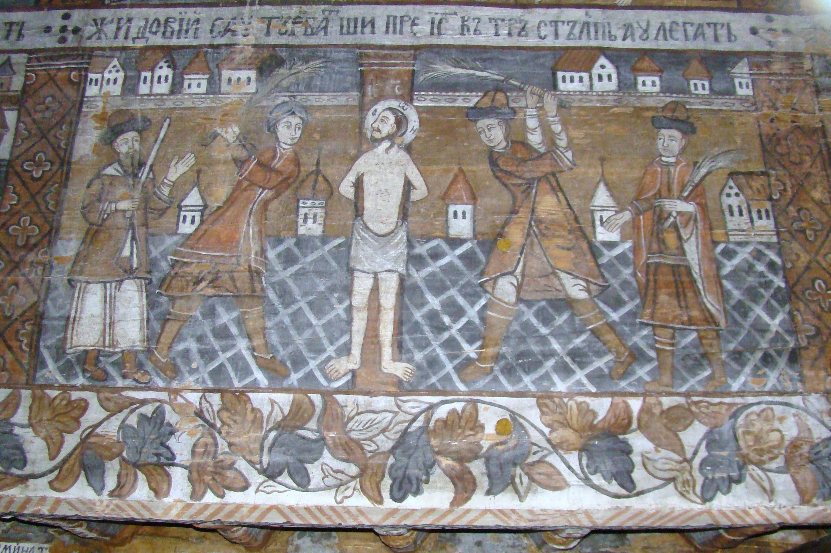 Biserica de lemn "Naşterea Maicii Domnului", sat IEUD